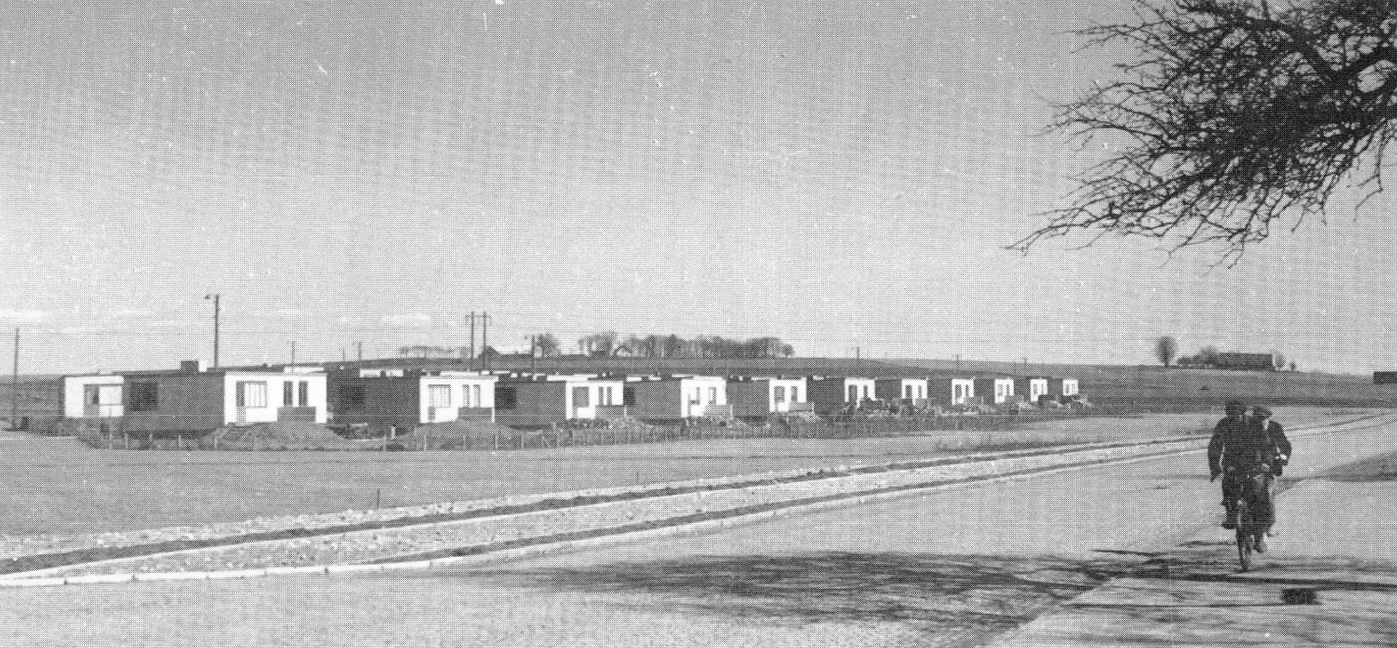 Vy över Östra småstugeområdet i östra Lund. Foto taget mellan 1938 och 1943.